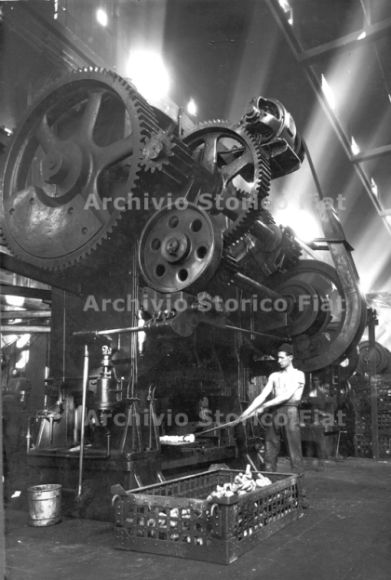 Fotografia della pressa sbavatrice all'interno del reparto grandi presse per stampaggio dello stabilimento Fiat Lingotto, Torino (Fiat Group Marketing & Corporate Communication spa, Archivio e centro storico Fiat, Archivio iconografico, Album Tematici, album 96)